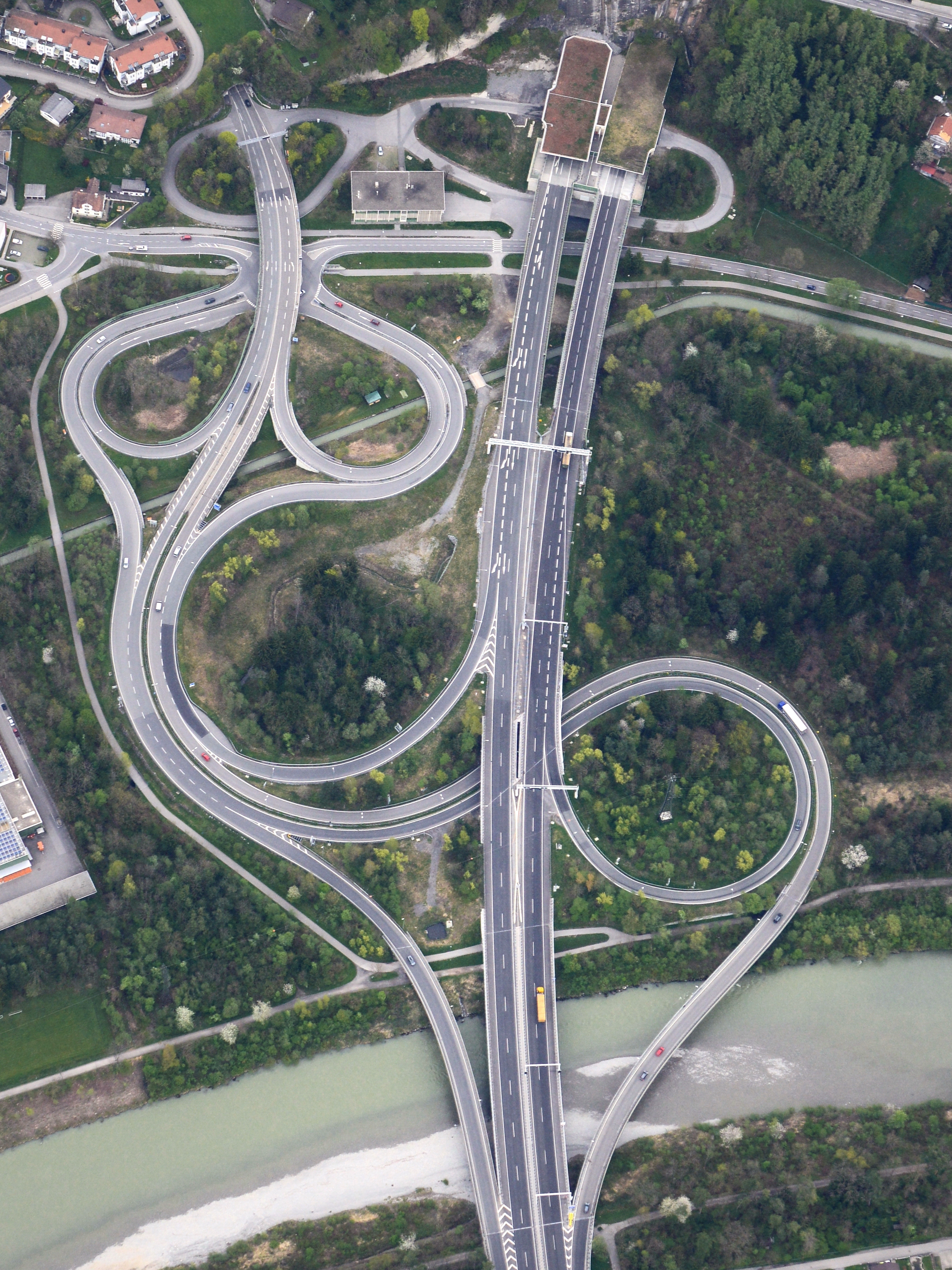 Rheintal/Walgau Autobahn, A14 . Der nun mehr fertig gestellte Verkehrsknoten Weidach bei Bregenz. Aus-Einfahrt zum Pfändertunnel (Bild rechts) sowie Citytunnel (Bild links). Im Vordergrund die Bregenzerache; Blick aus einem Heissluftballon.